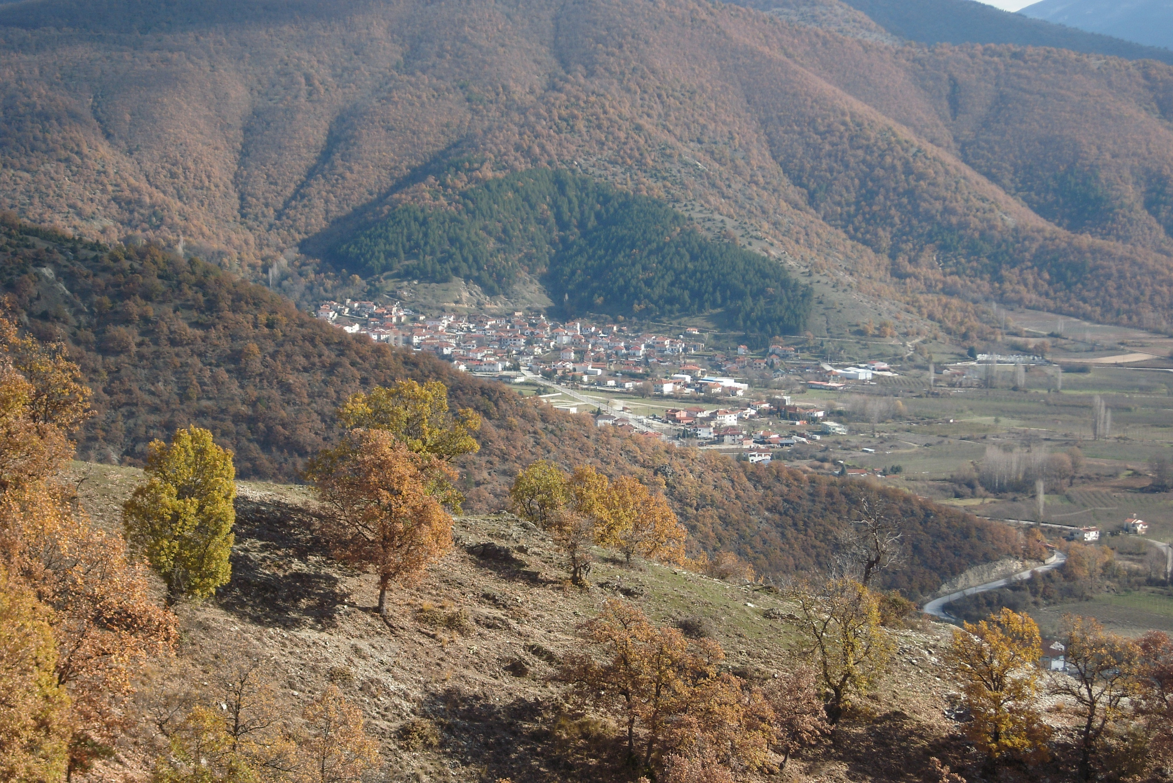 Тихолища от пътя Сетома - Шестево.